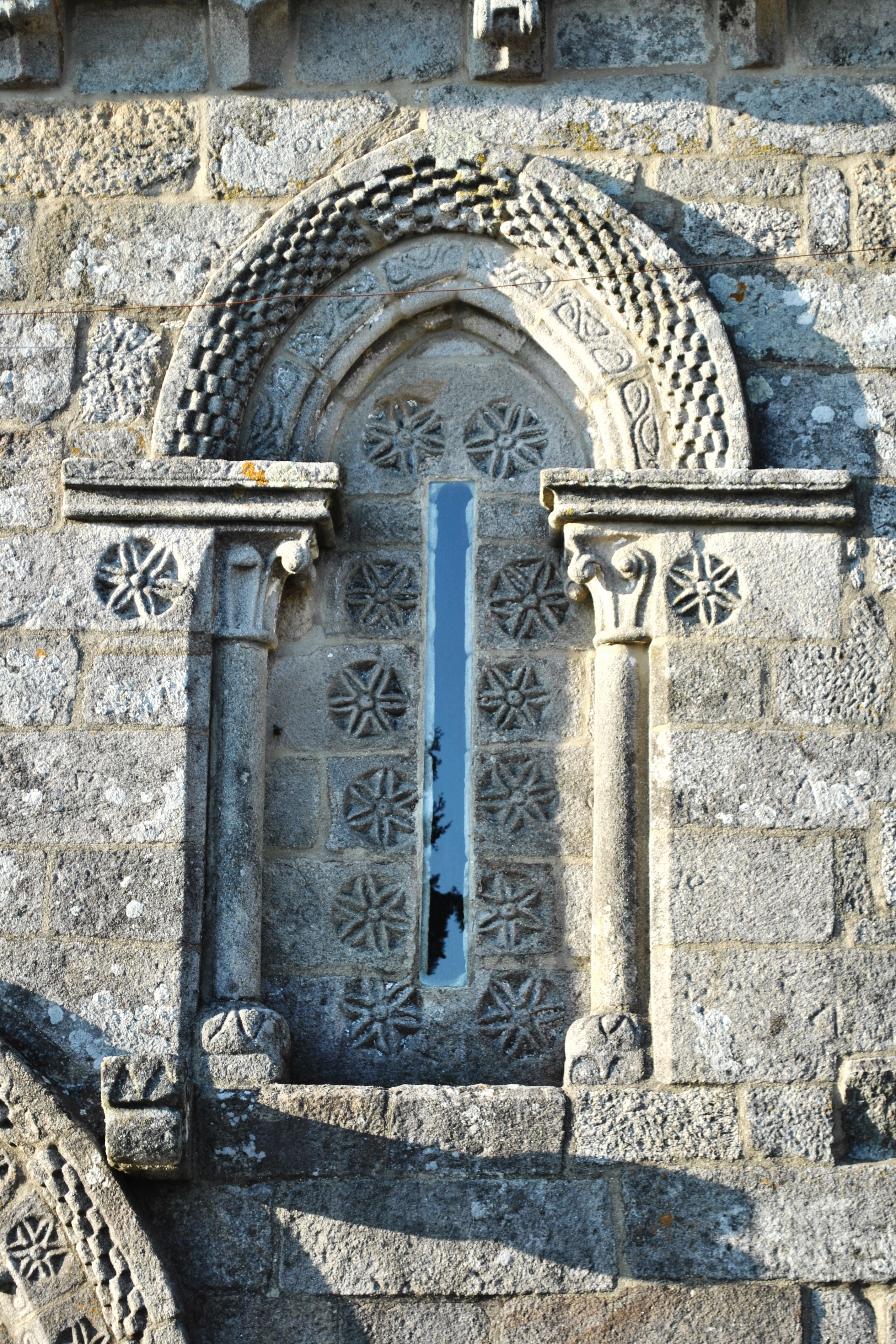 Vexa o título e as categorías.